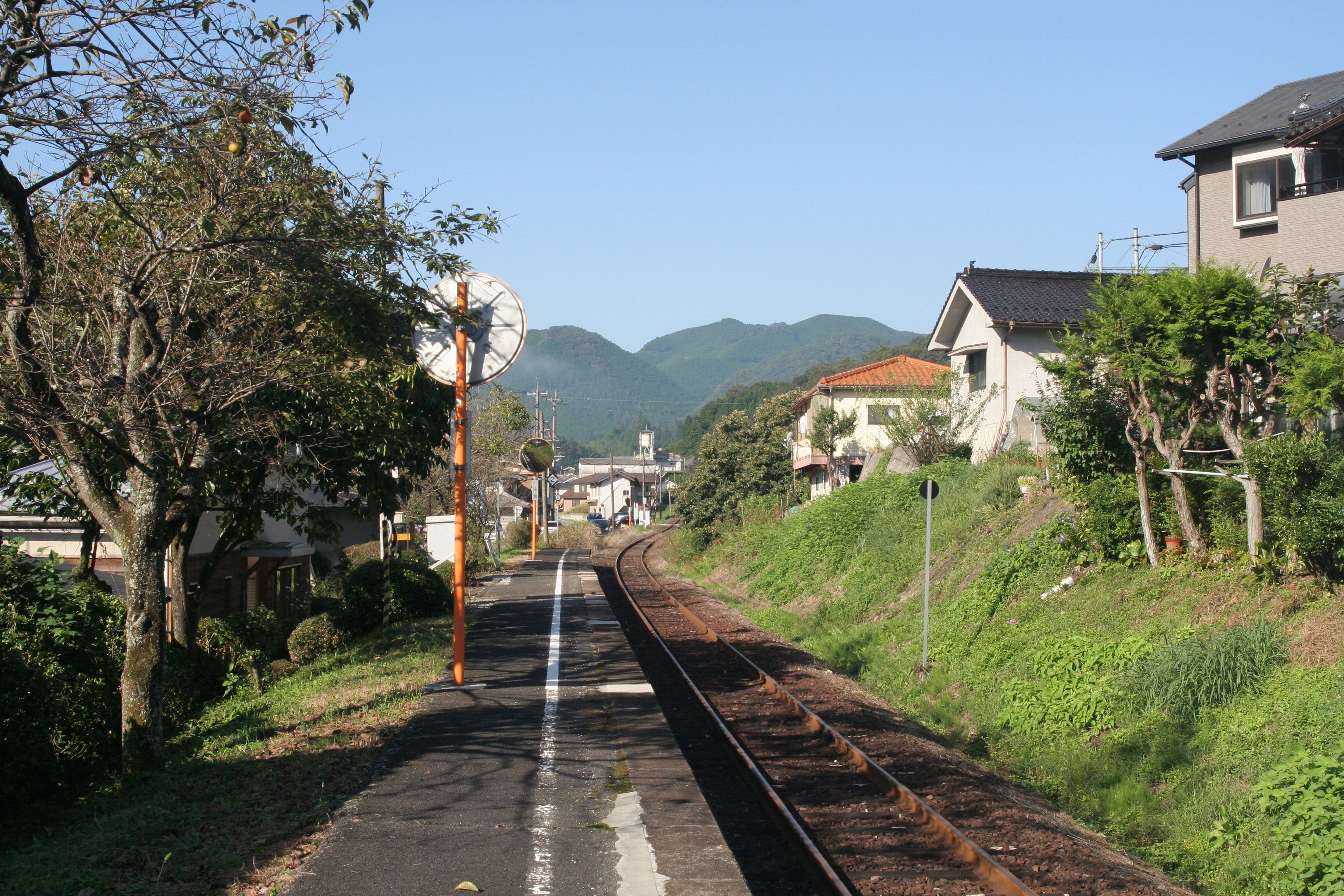 西日本旅客鉄道 市岡駅の構内